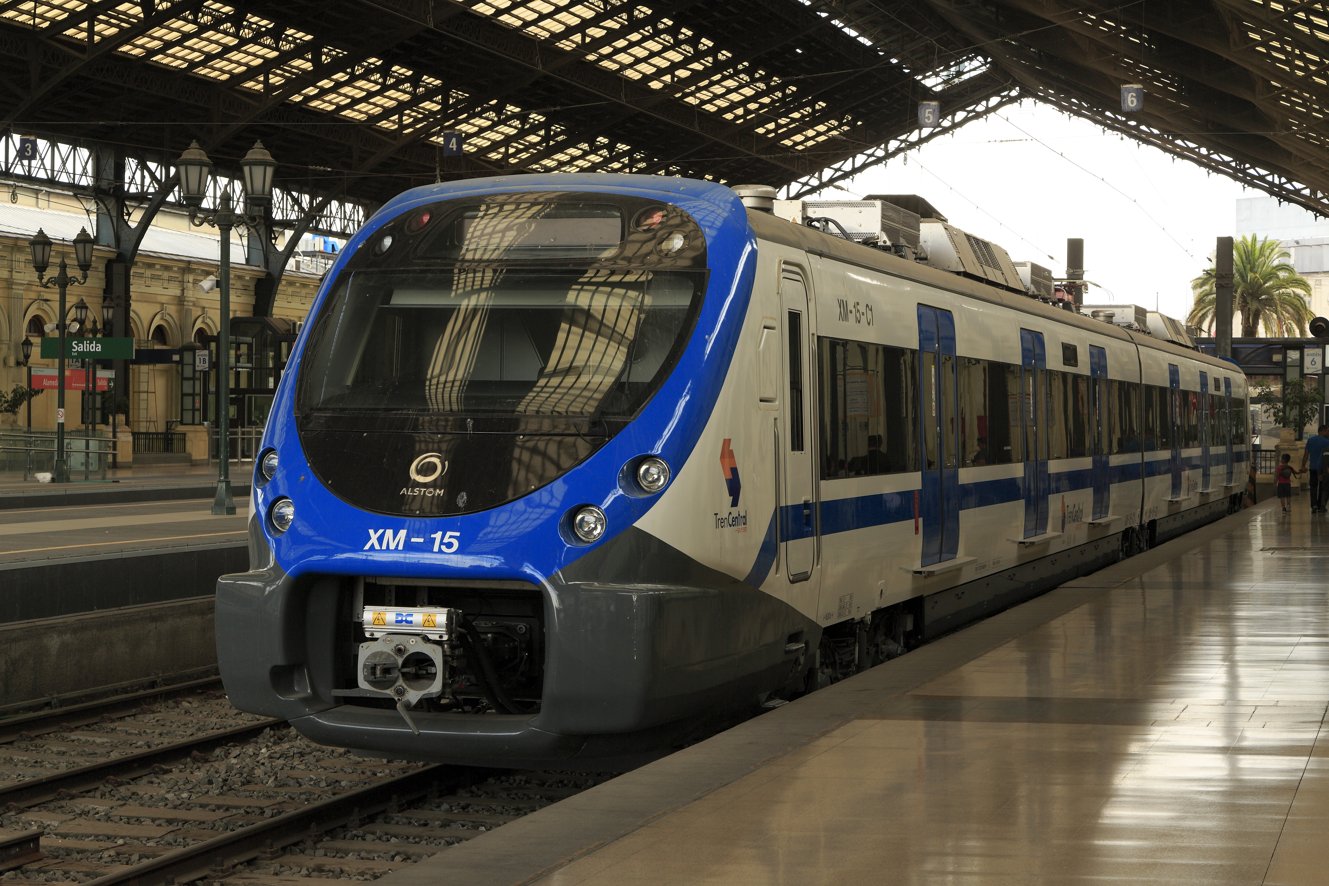 Doppeleinheit Bauart X’Trapolis Modular auf dem Gleis 6. Die von Alstom gelieferten Triebwagen basieren auf den S-Bahn-Triebwagen des Typs Civia von CAF. Die Wagen sind auf eine Bahnsteighöhe auf Wagenbodenhöhe ausgelegt, der Bahnsteig 4/5 wurde auf einer für zwei Einheiten ausreichenden Länge erhöht. Die Wagen wurden zumindest teilweise schon 2015 geliefert, die hier vorgesehene S-Bahn-Strecke nach Nos ist noch nicht in Betrieb.Ungewöhnlich für Gelenktriebwagen in dieser Form ist, dass beide Stromabnehmer auf nur einem der beiden Wagenteile aufgebaut sind.